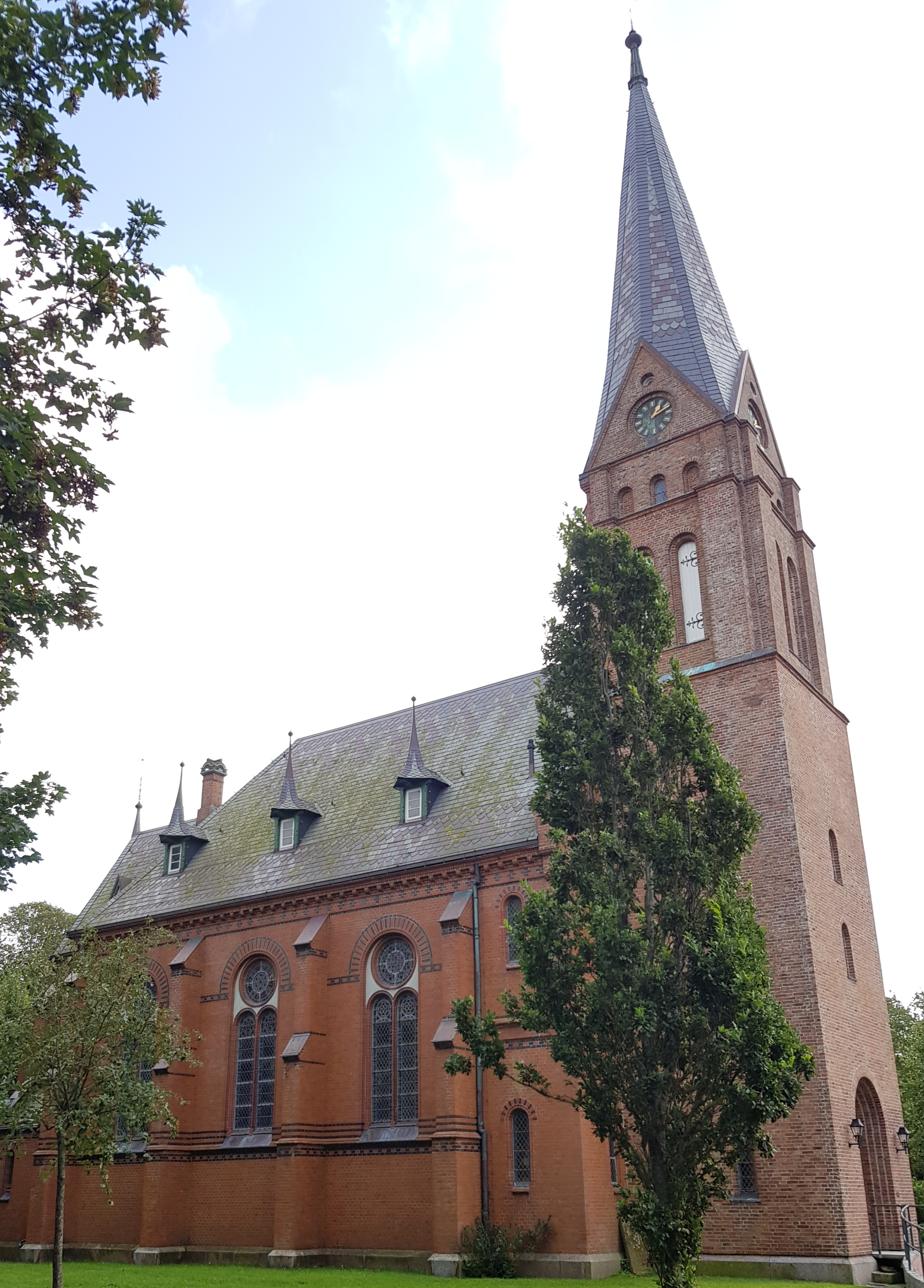 Die Galmsbüller St. Gallus-Kirche